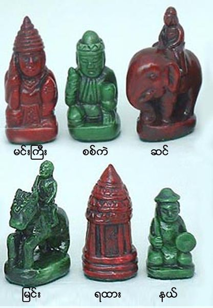 Pièces de sit-tu-yin.